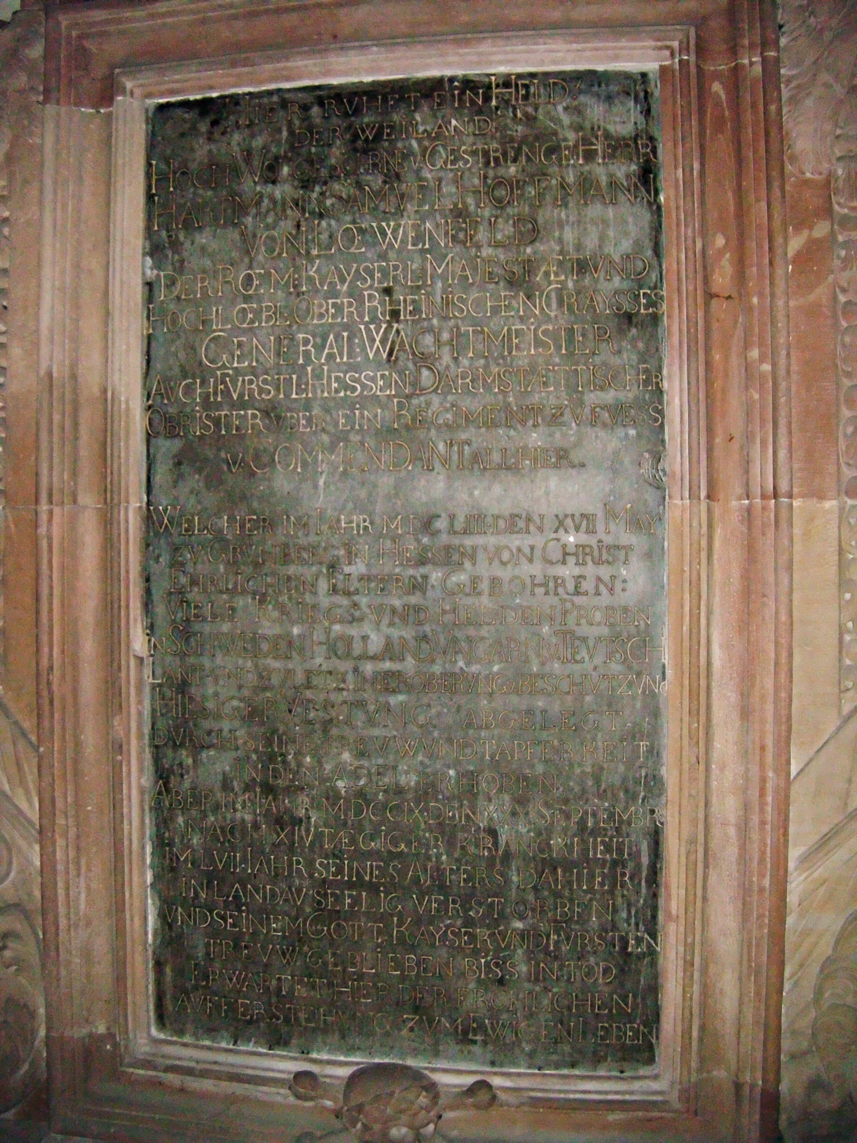 Landau in der Pfalz, Katharinenkapelle, Grabmal des Generals Hartmann Samuel Hoffmann von Löwenfeld (1653-1709), Grabinschrift